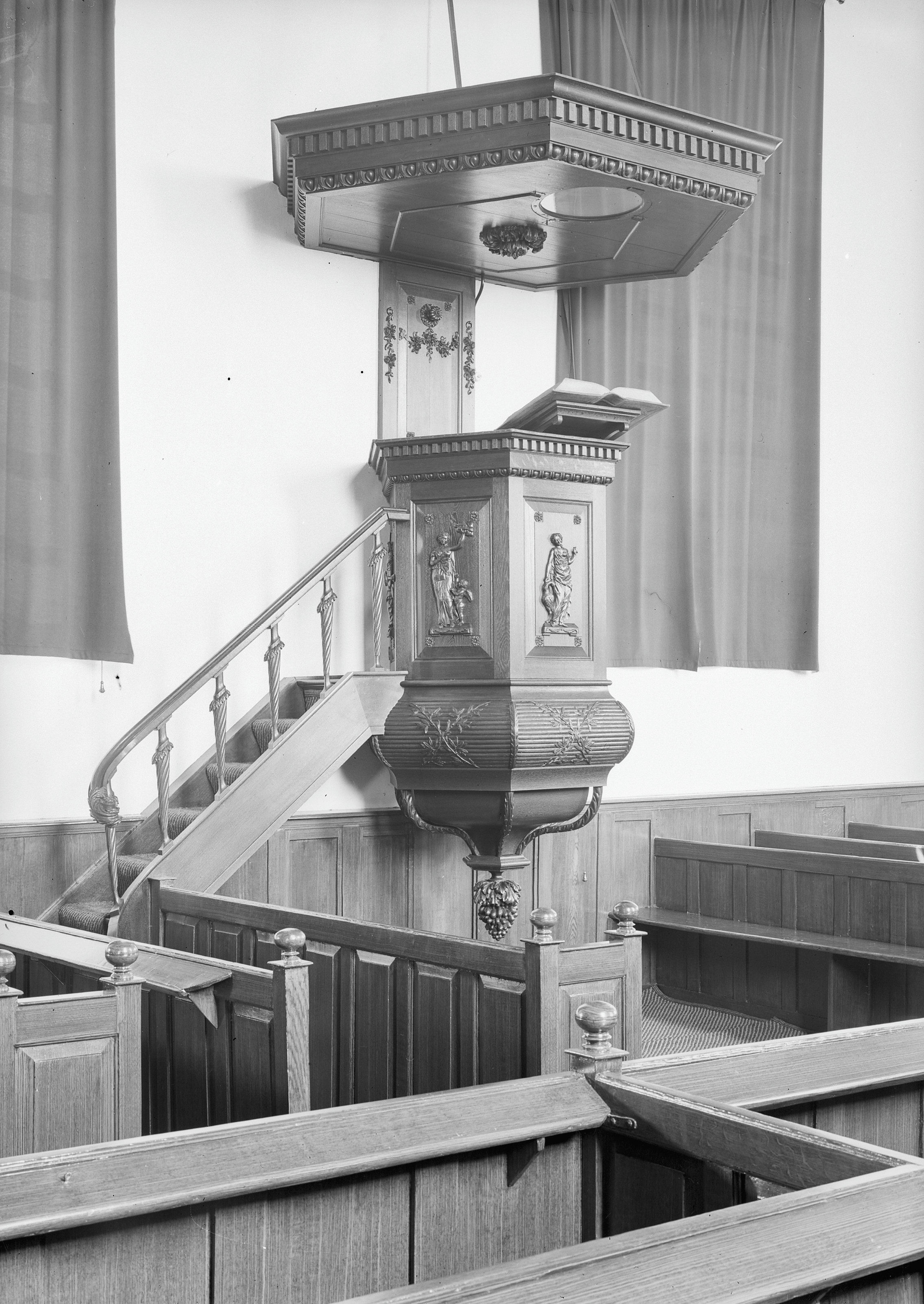 Nederlands Hervormde Kerk: interieur naar het oosten en preekstoel